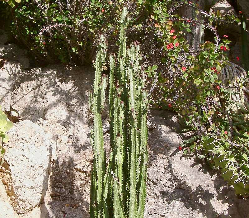 Euphorbia trigona, BG Jardin Exotique in Monaco